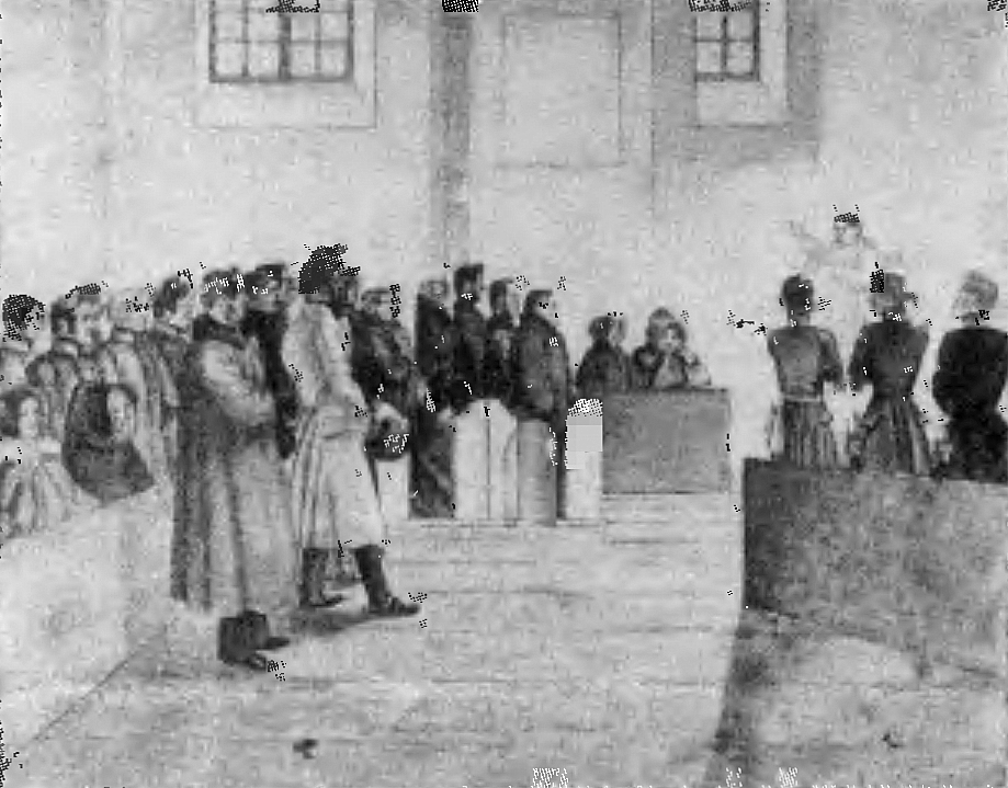 Nabożeństwo w kościele franciszkanów w Sanoku - akwarela Jana Nepomucena Gniewosza. W środku widoczny z czapką naczelnik obwodu sanockiego, Ernest Uherek.